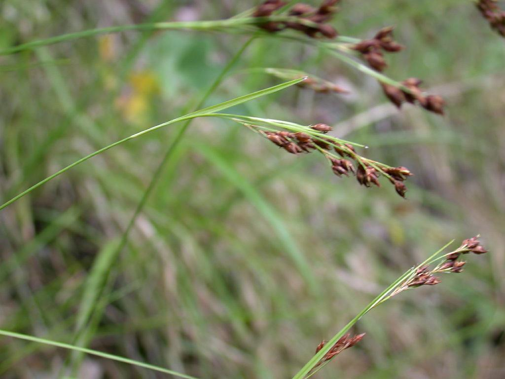 Rhynchospora_brownii（Cyperaceae)：トラノハナヒゲ 和歌山県田辺市 Tanabe city, Wakayama pref. Japan 2004年7月27日